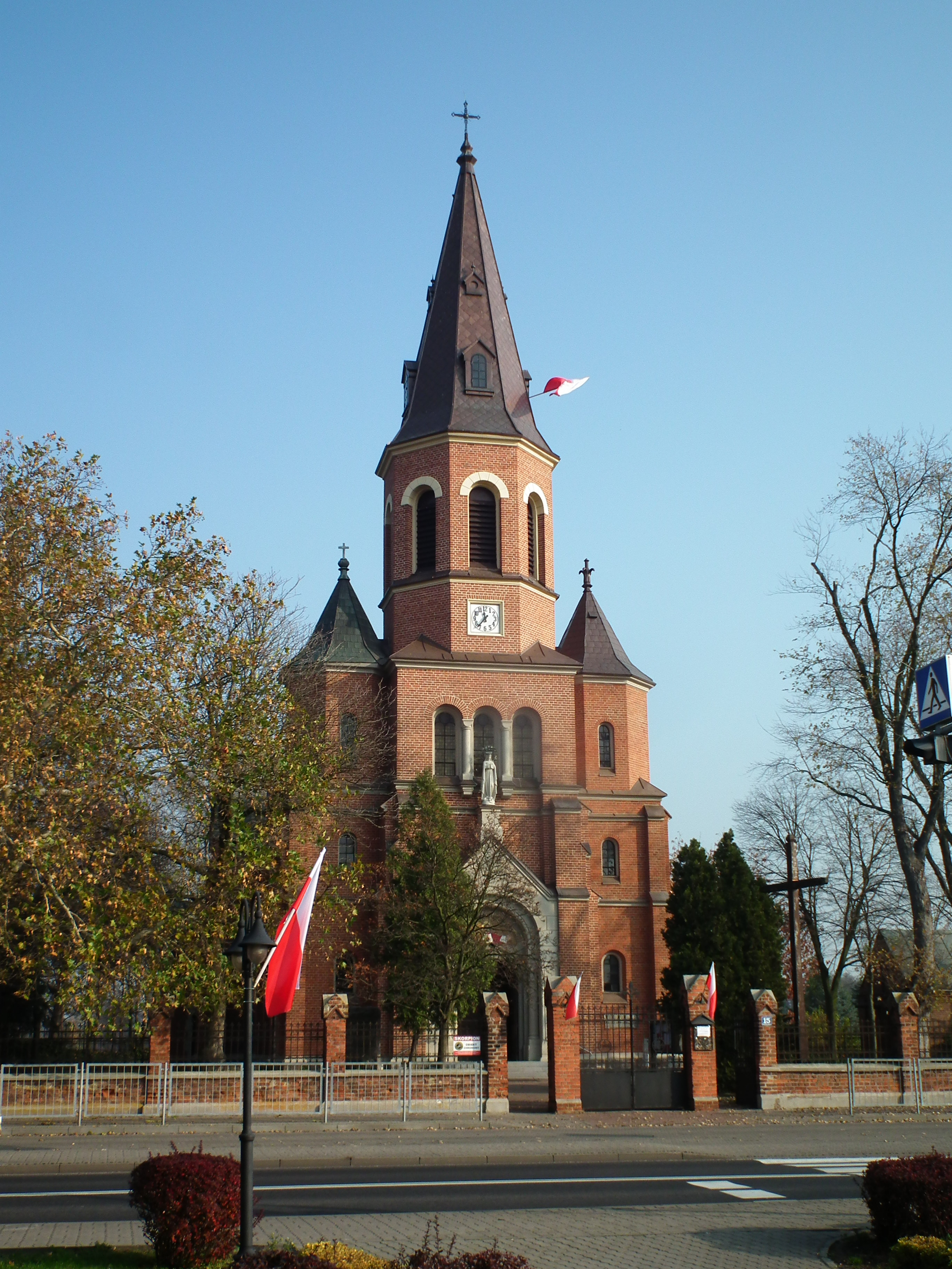 Kościół Najświętszego Serca Pana Jezusa w Lubieniu Kujawskim.